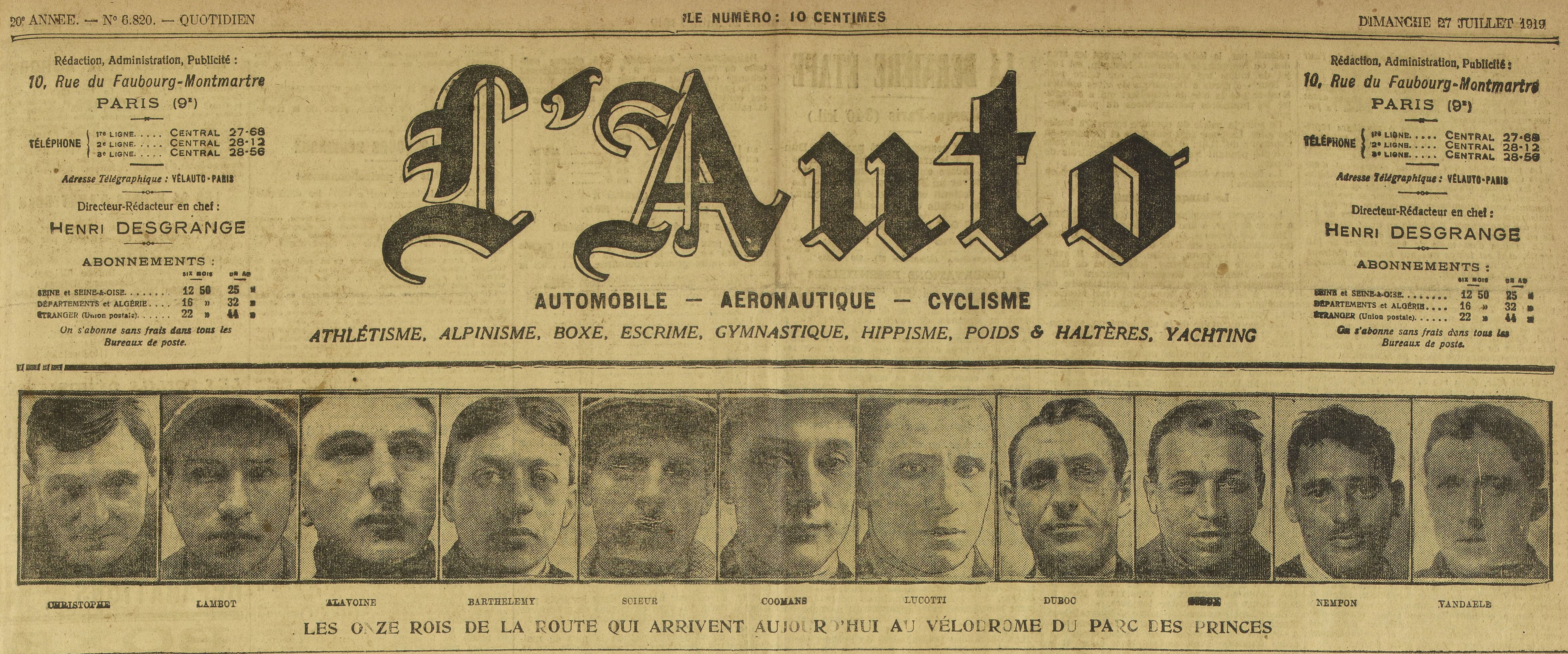 La une du journal L'Auto, le 27 juillet 1919, présente les derniers coureurs en lice pour la dernière étape du Tour de France 1919 arrivant à Paris.